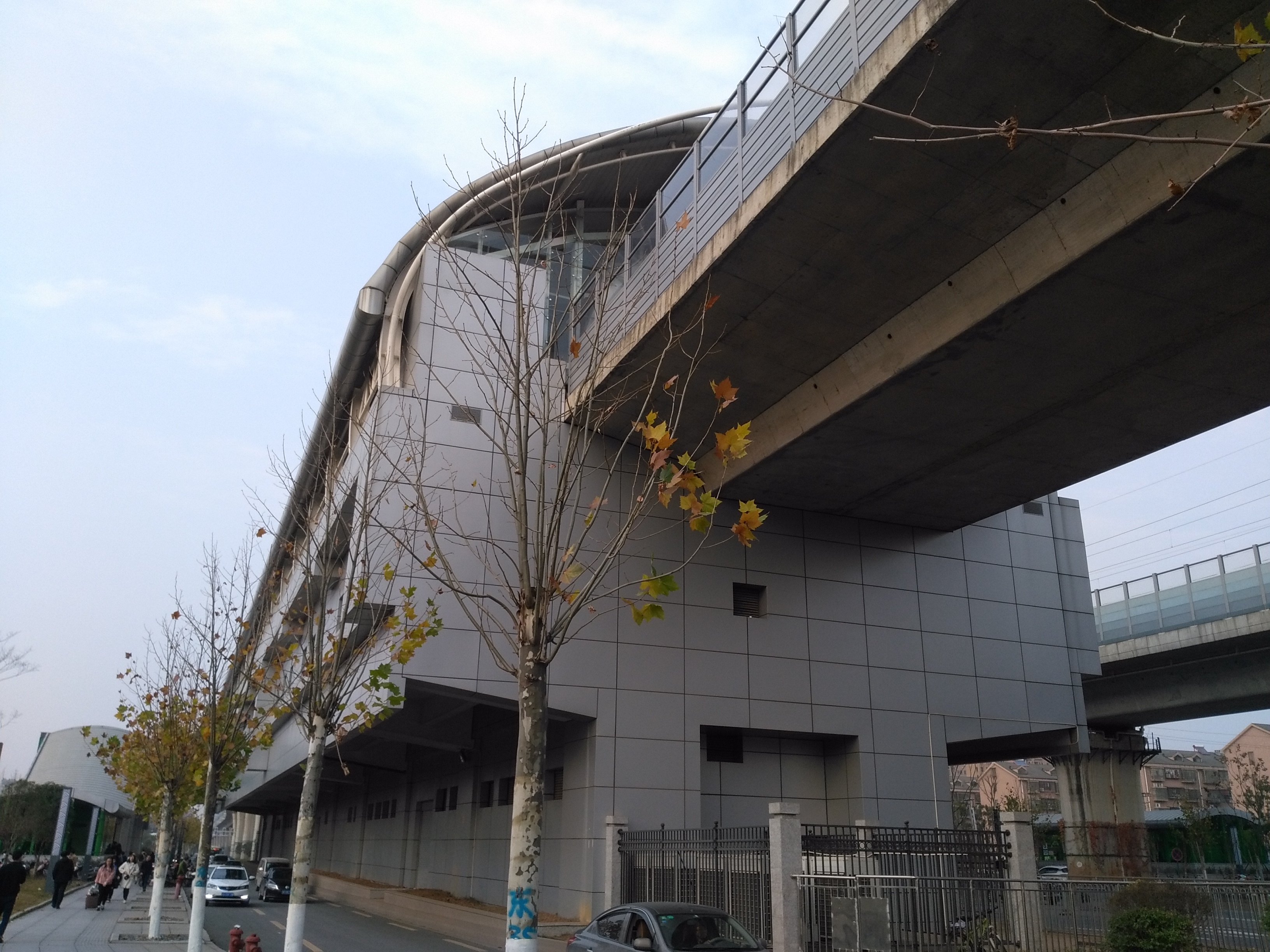 长沙地铁一号线尚双塘高架车站